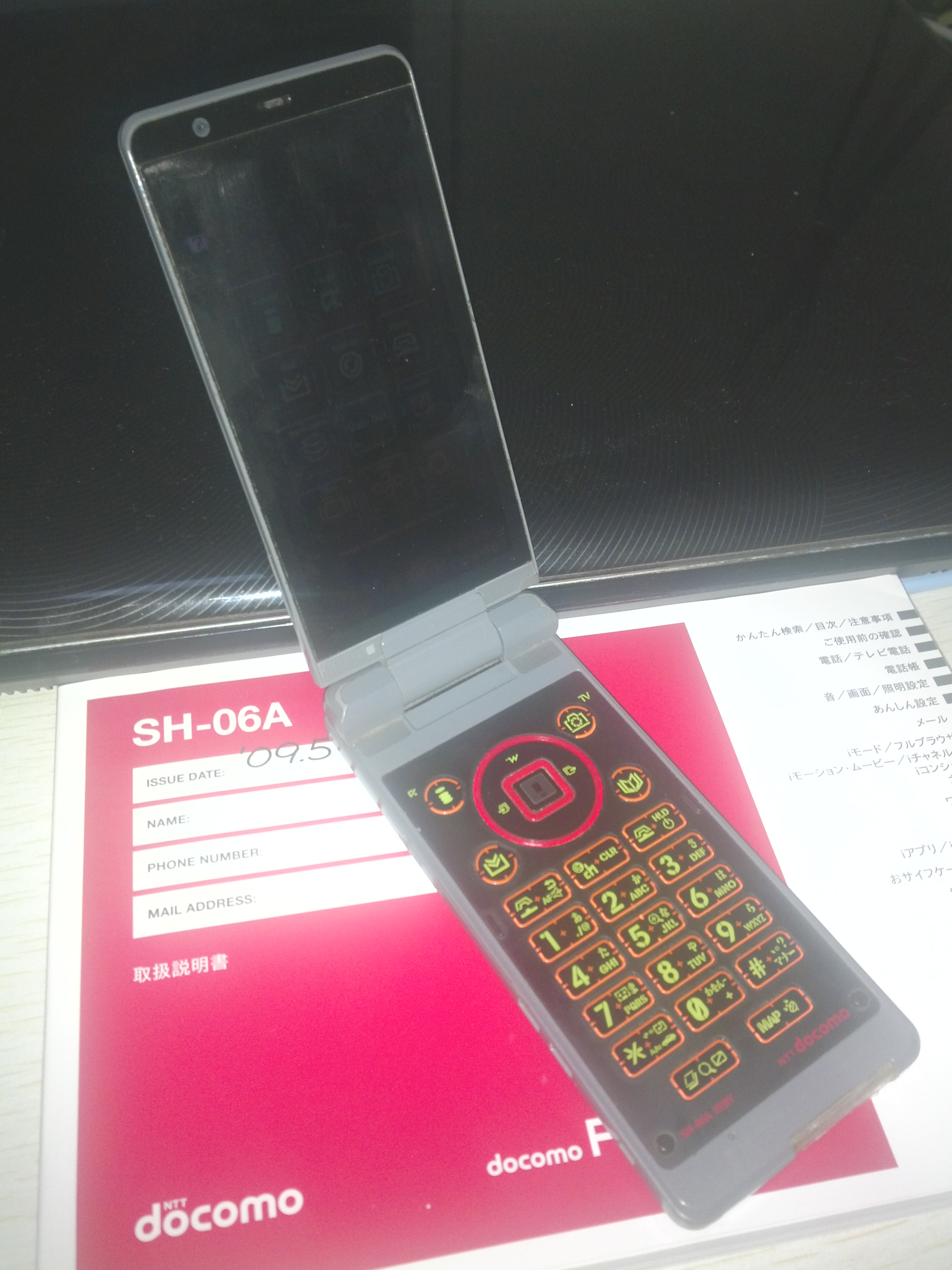 SH-06A NERV翻盖打开状态